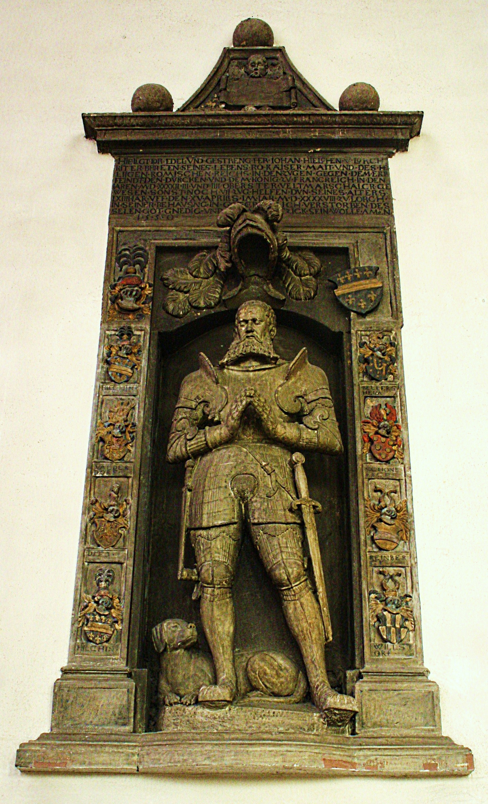 Epitaph (Mitte 16. Jh.) des Ritters Johann (III.) Hilchen von Lorch (geb. 1484, gest. 15. April 1548), in der Pfarrkirche St. Martin, Lorch (Rheingau)[1] ↑